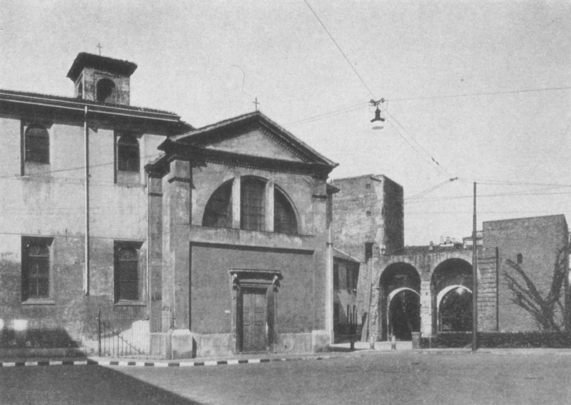 Milano, Chiesa di San Michele sul Dosso e la Pusterla di Sant'Ambrogio